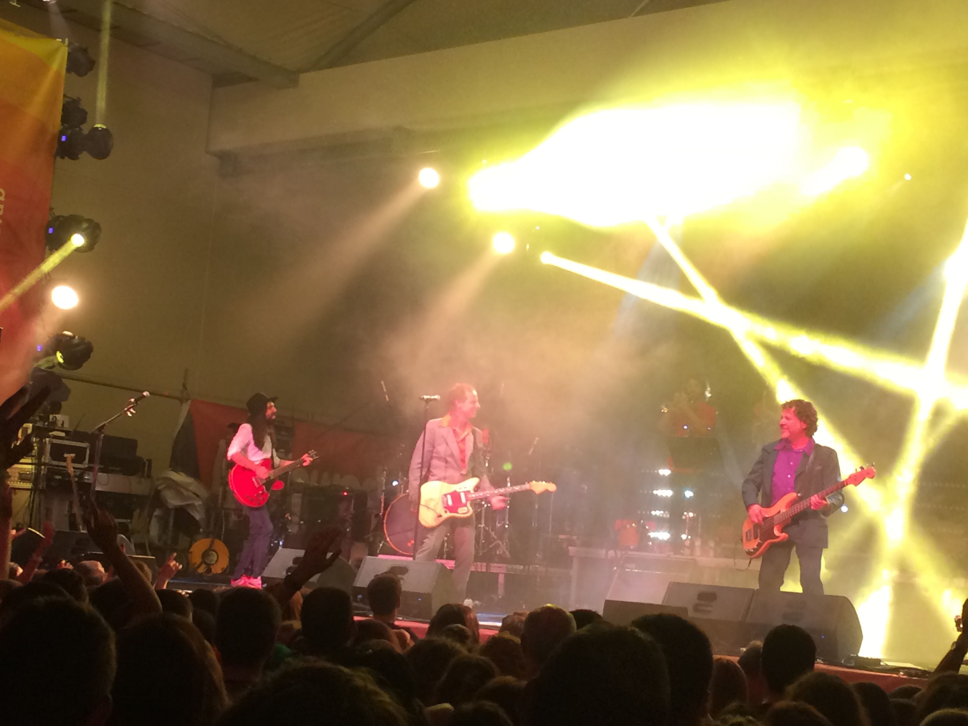 Concert del grup Els Pets a Vilanova i la Geltrú